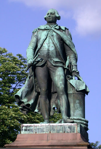 Statue de La Pérouse à Albi, sculpteur Nicolas Raggi, érigée en 1853.